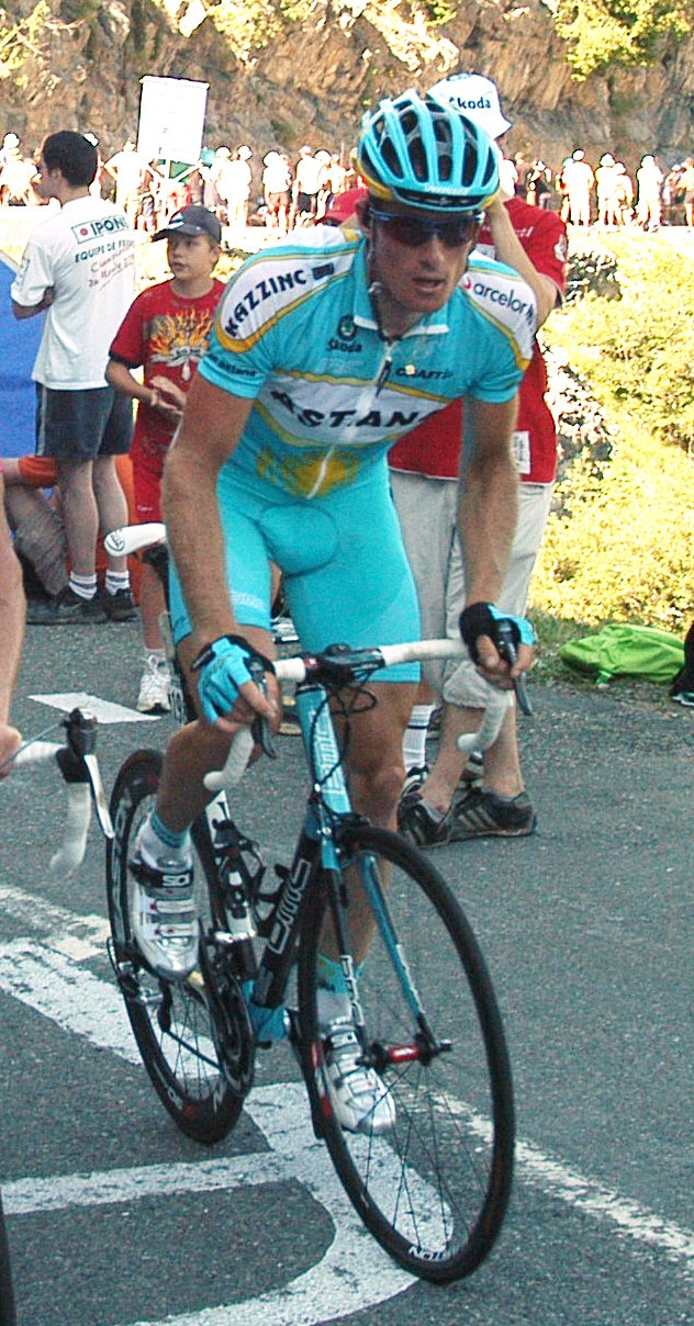 Grégory Rast at stage 7 of the Tour de France 2007 on the Col de la Colombière.